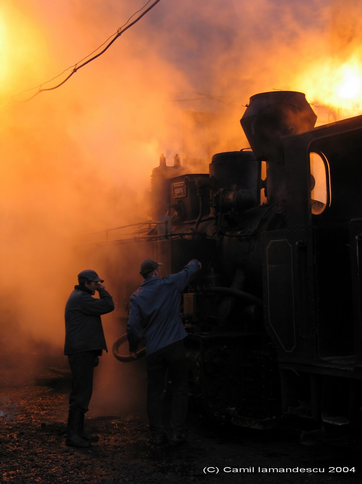 Dimineata la depoul caii ferate inguste a Vaserului, 2004